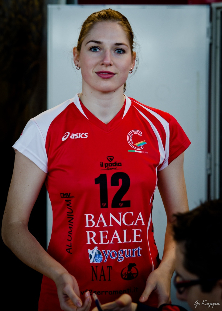 2012-11-07 A1f Giaveno 115